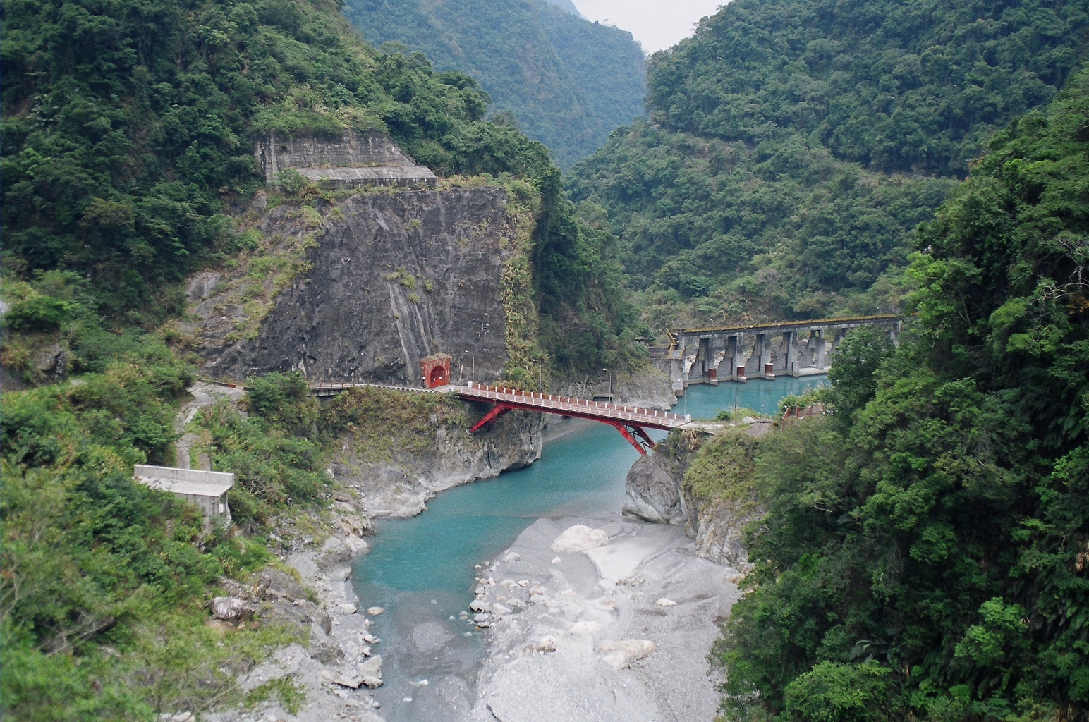 臺灣電力公司東部發電廠-水簾壩